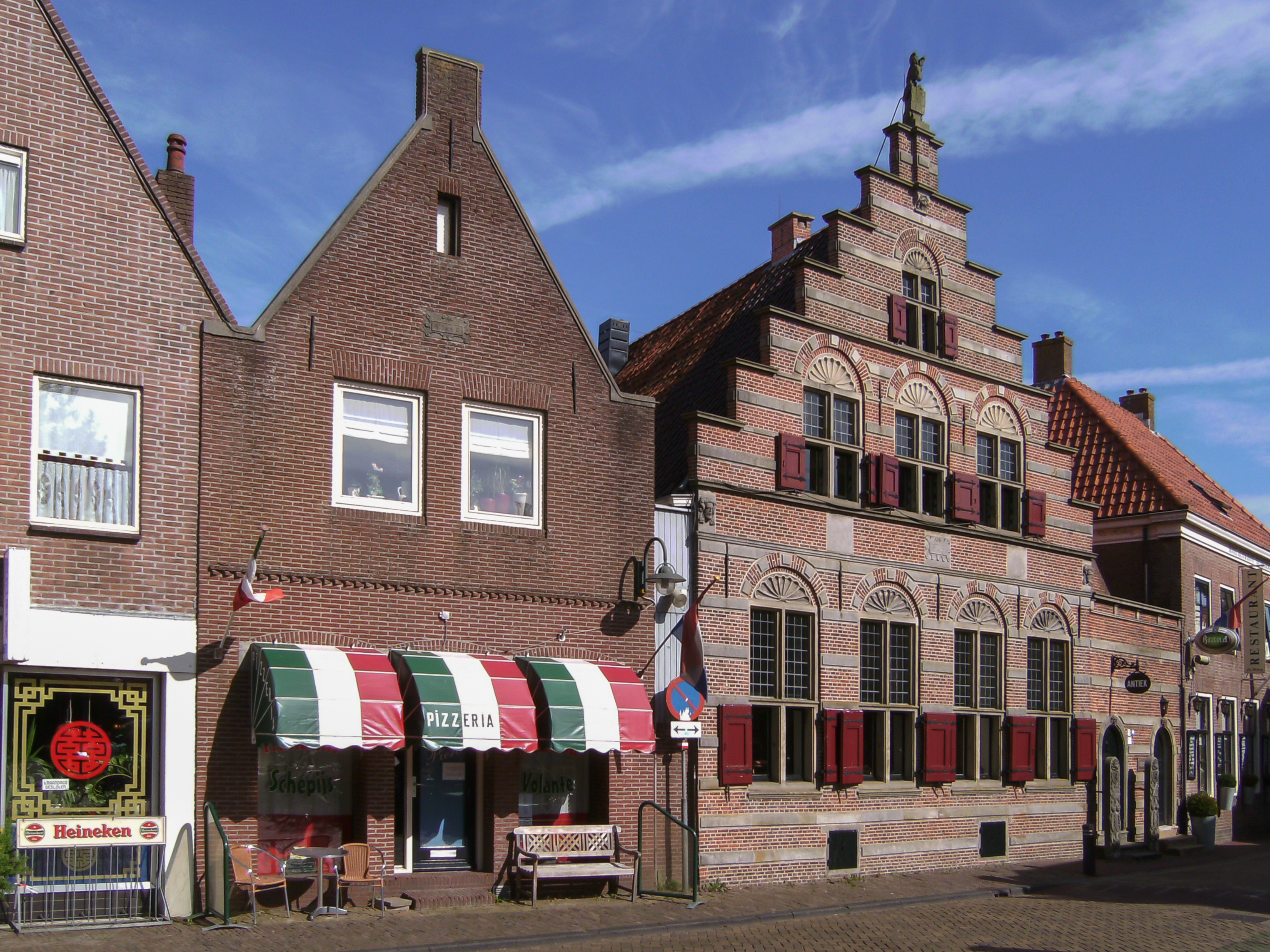 Vollenhoven, monumentale panden